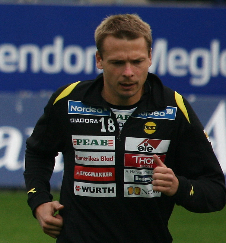 Arild Sundgot